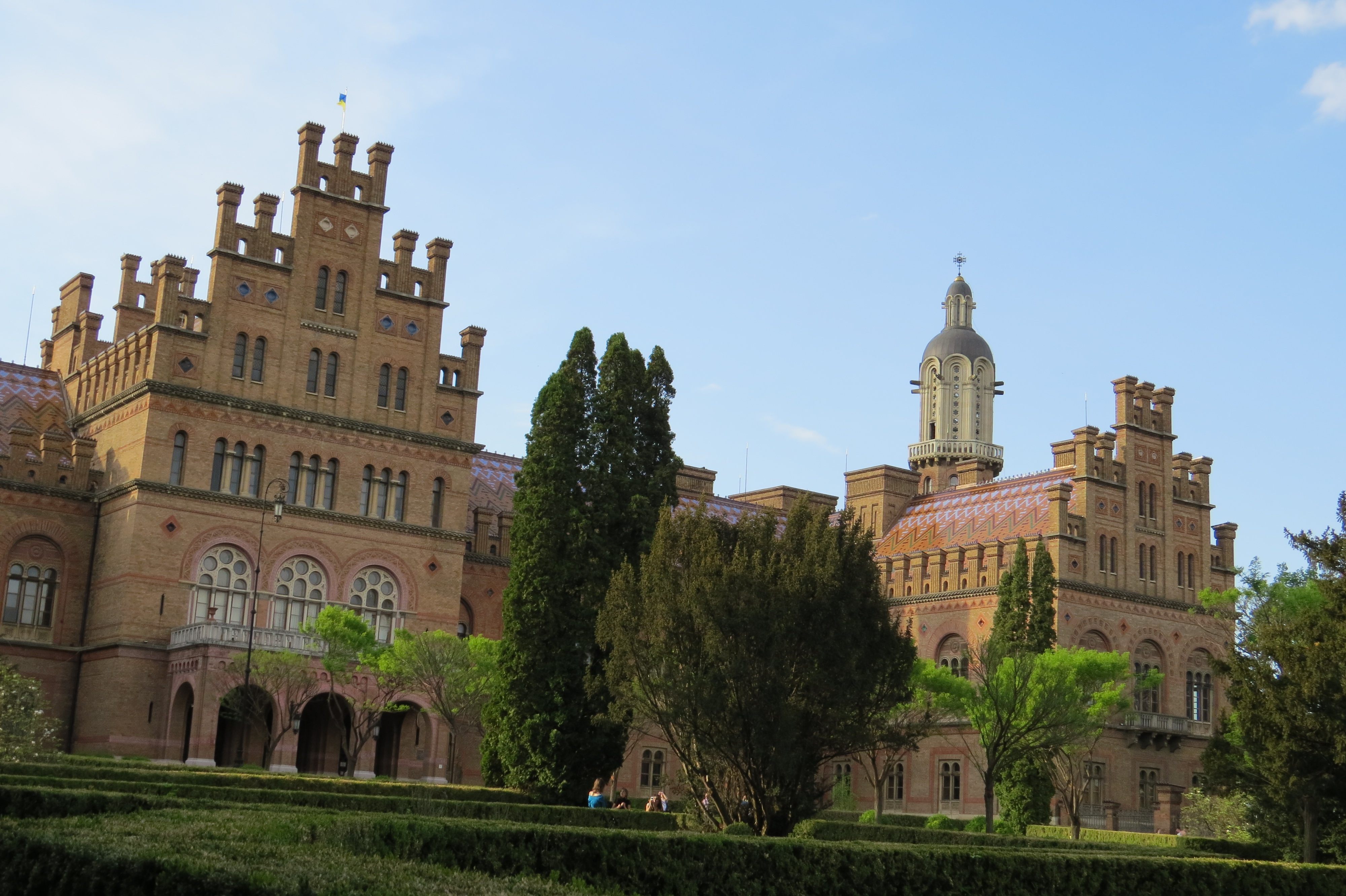 Резиденція буковинських митрополитів (мур.), Чернівці, вул. Коцюбинського, 2